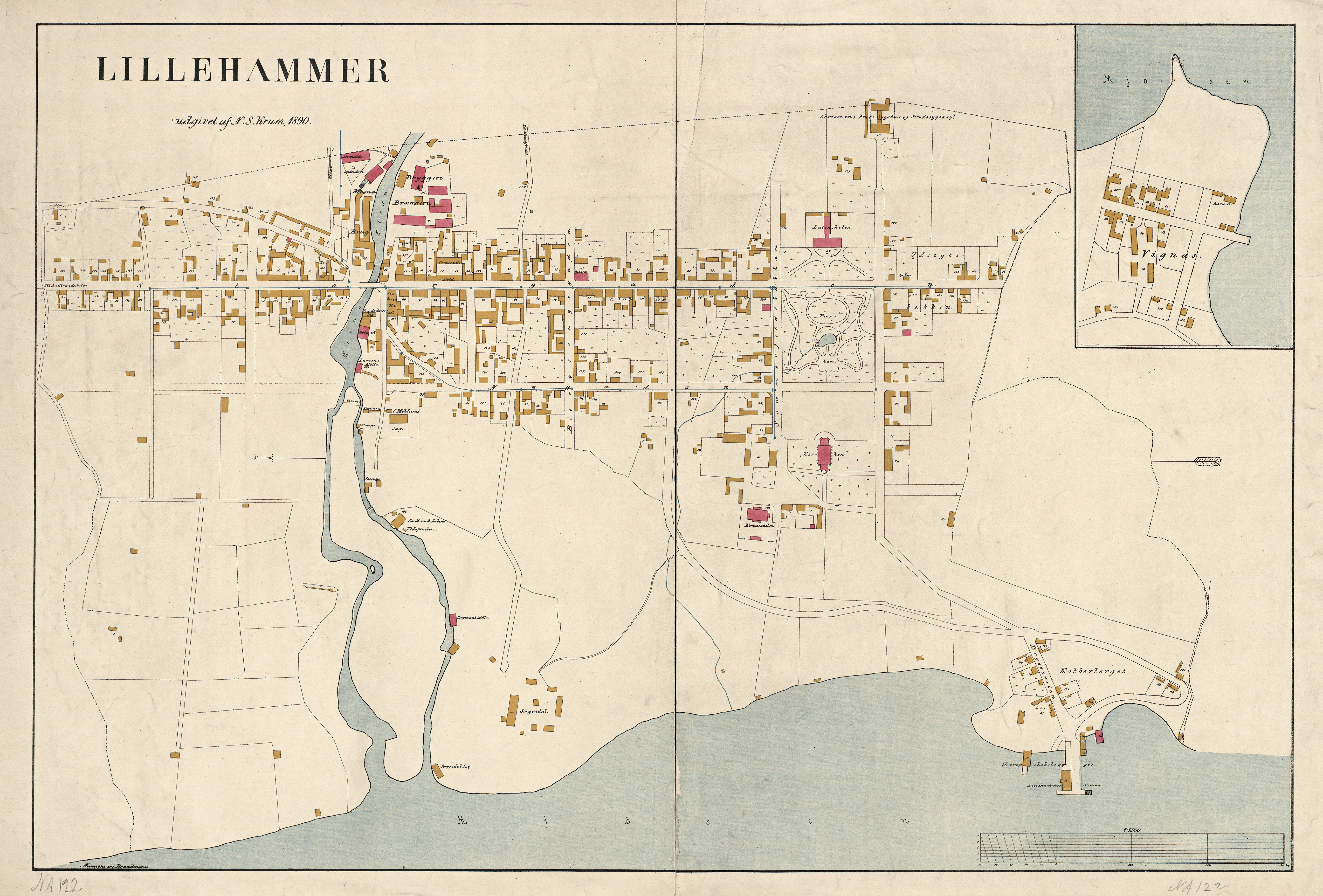 Kart over Lillehammer (1890)